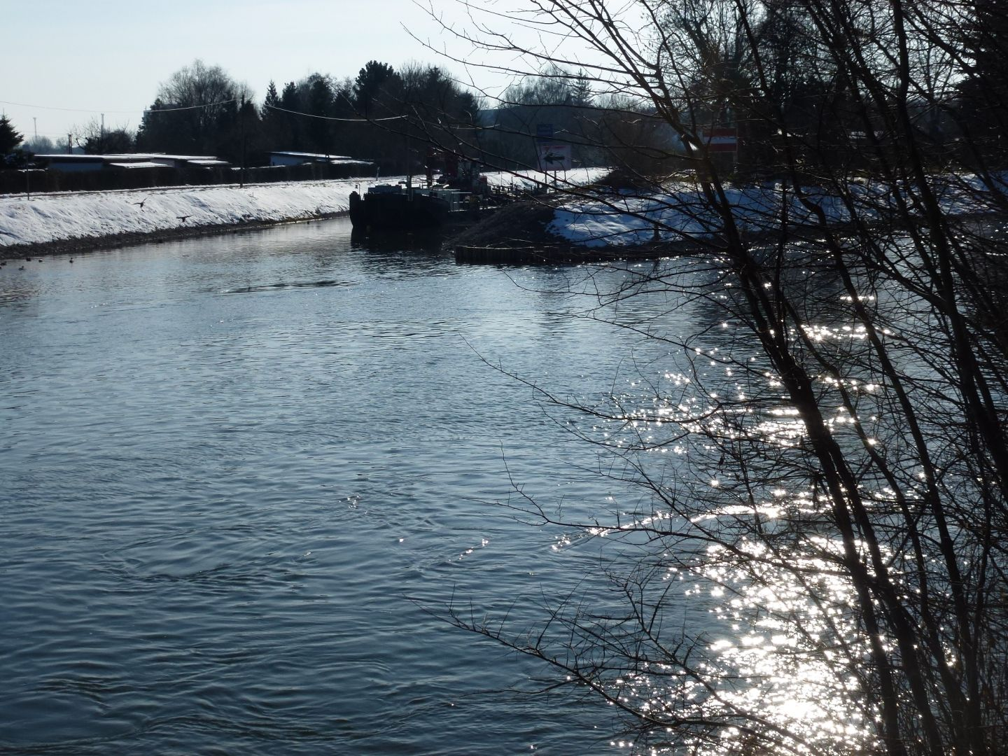 Saaleschleuse Rischmühle bei Merseburg